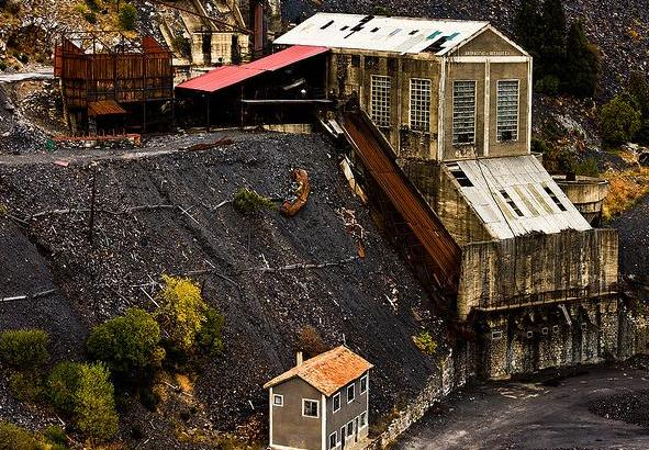 Imagen de una mina abandonada en Velilla del Río Carrión (Palencia) en España.